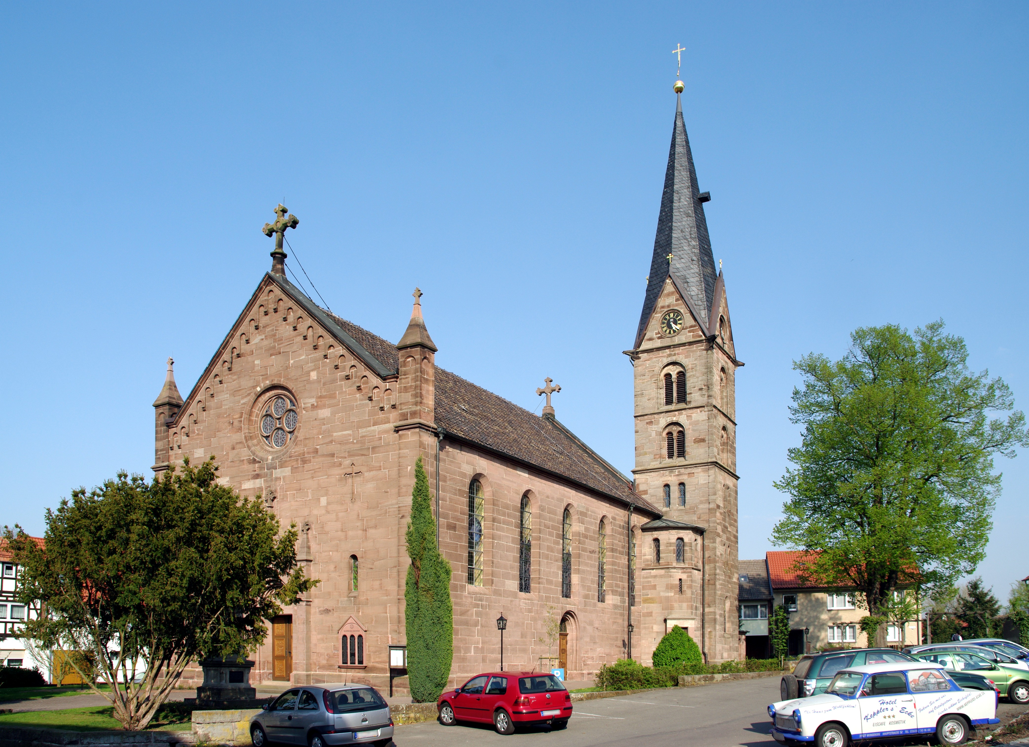 Die Kirche in Wingerode.